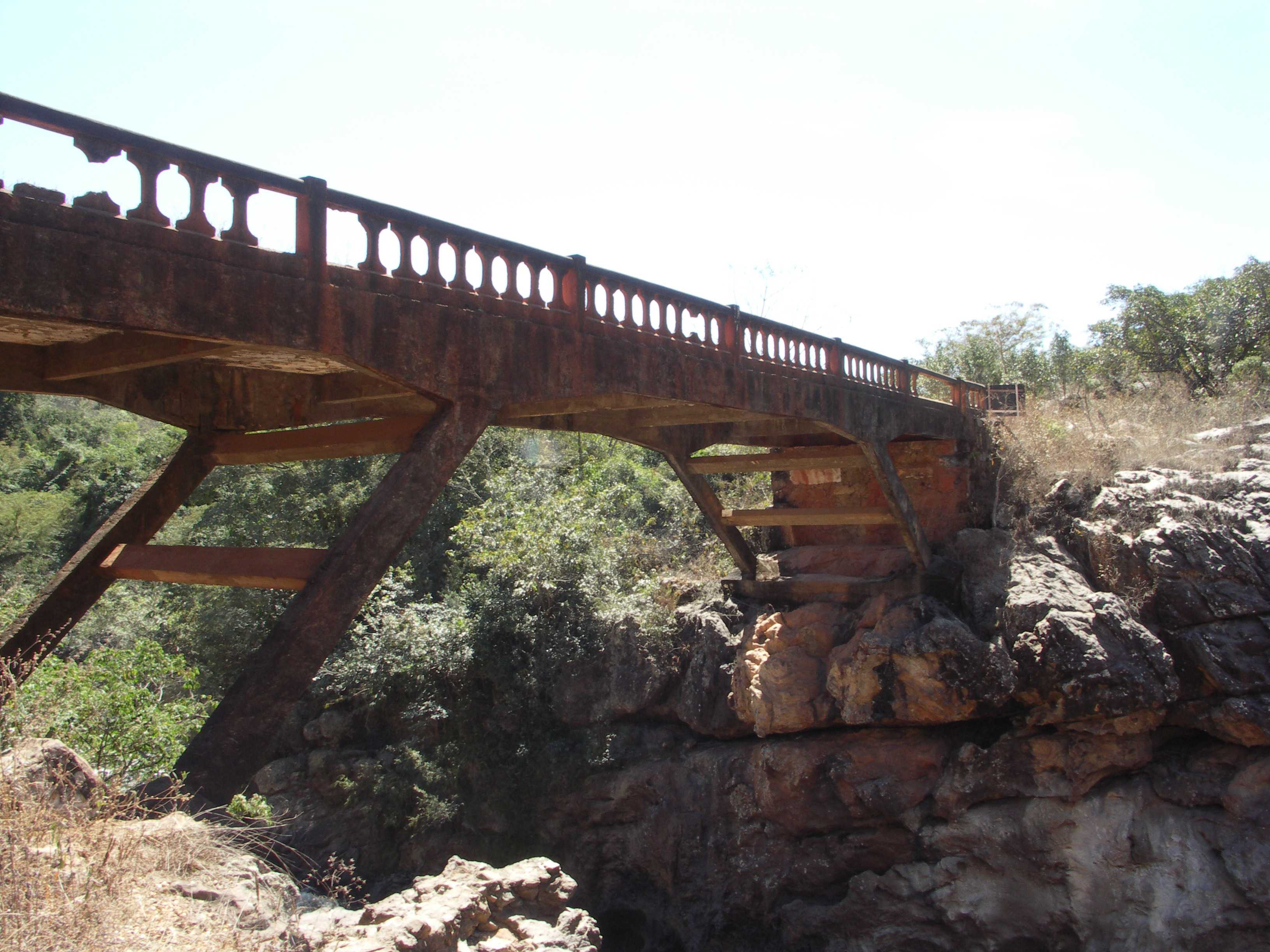 Estrada Real, Caminho dos Diamantes